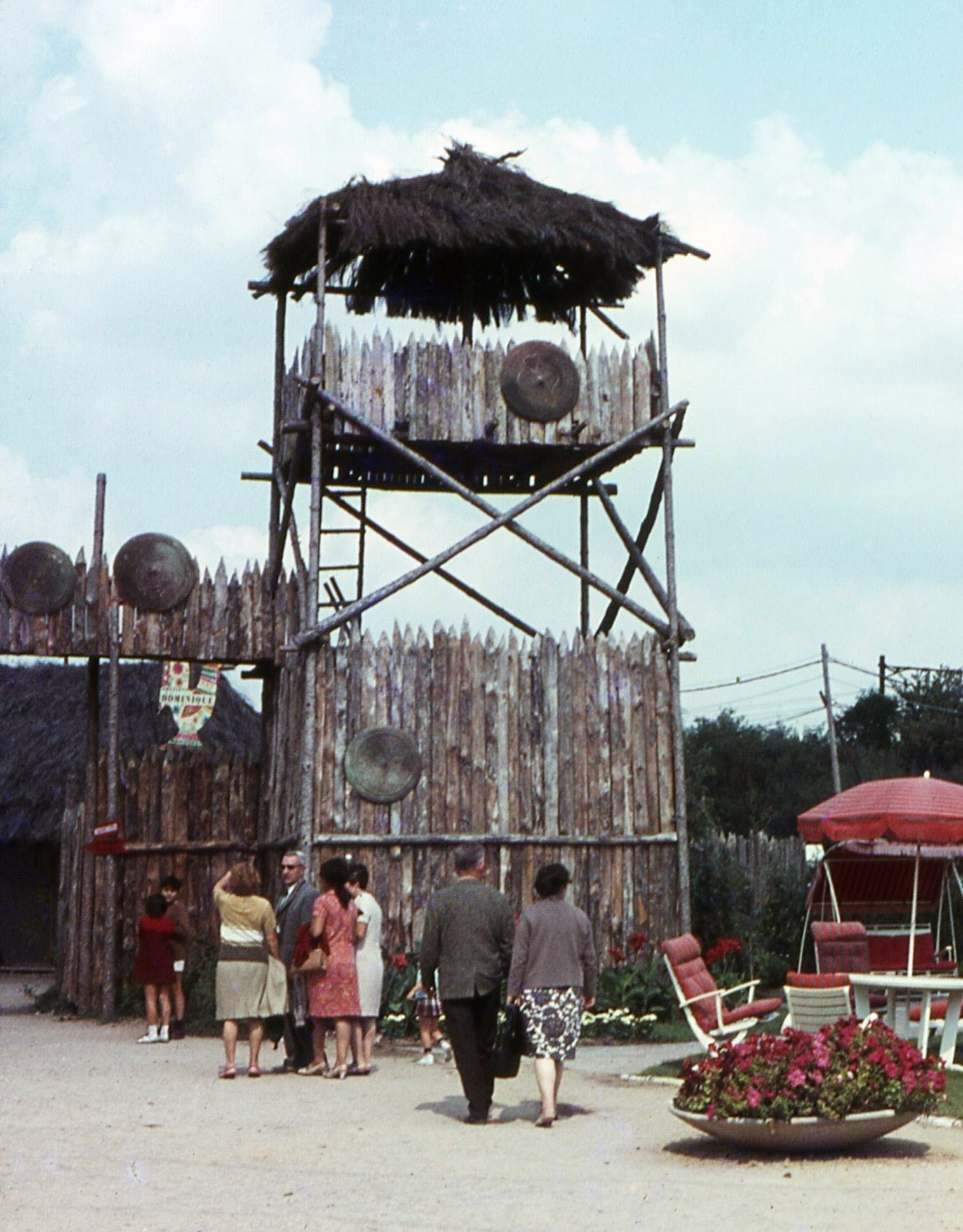 L'entrée du village gaulois des Floralies internationales 1967, Parc Floral de la Source, Orléans, Loiret, France